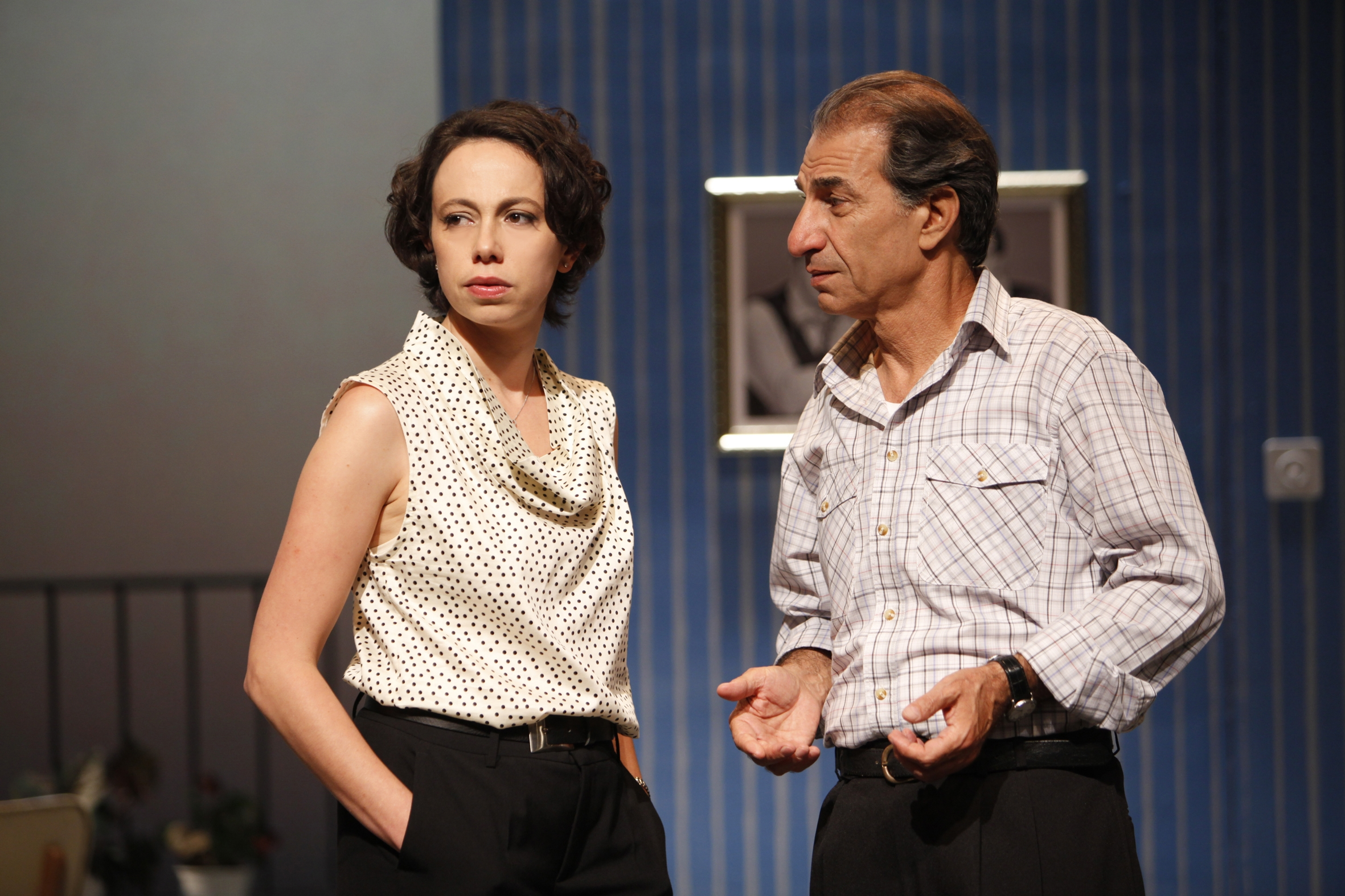 קרן צור וששון גבאי בהצגה רוחל'ה מתחתנת